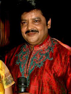 Udit Narayan at director Gajendra Singh's birthday bash